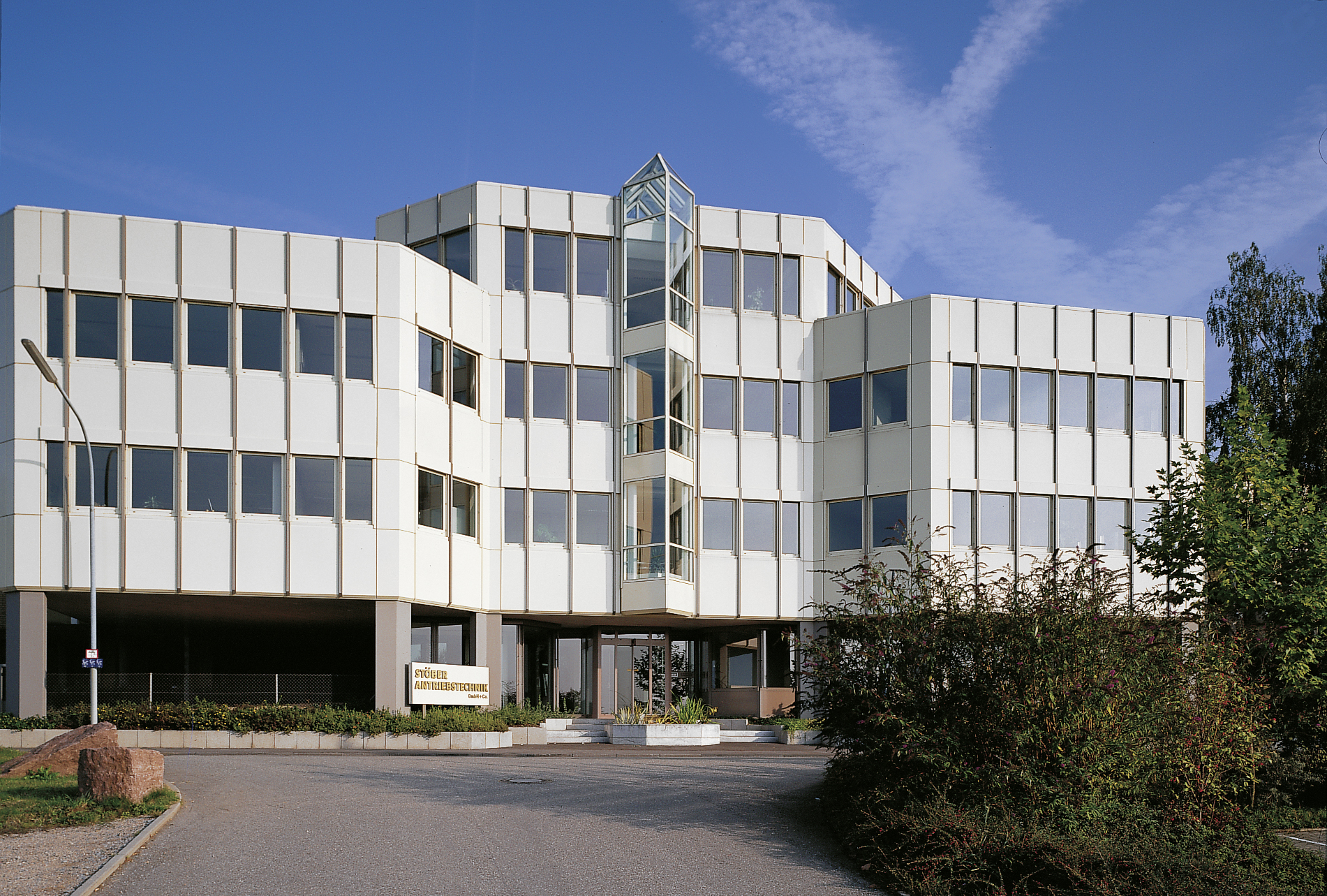 Headquarter STOEBER ANTRIEBSTECHNIK GmbH & Co. KG, Pforzheim, Germany